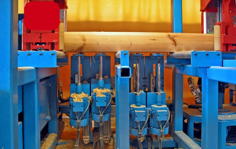 4-fach Bohrgerät zur gleichzeitigen Bearbeitung unterschiedlicher Bohrungen an einem Werkstück